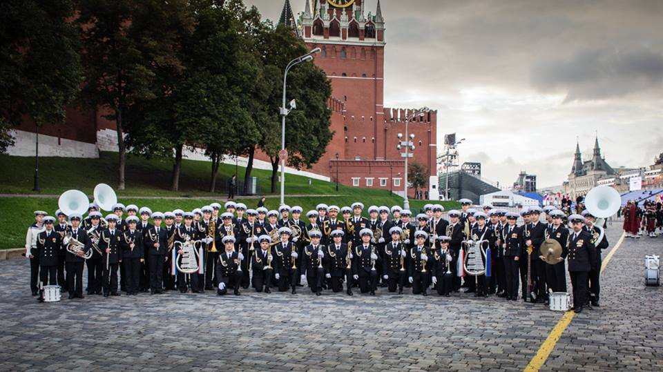 Центральный концертный образцовый оркестр ВМФ России